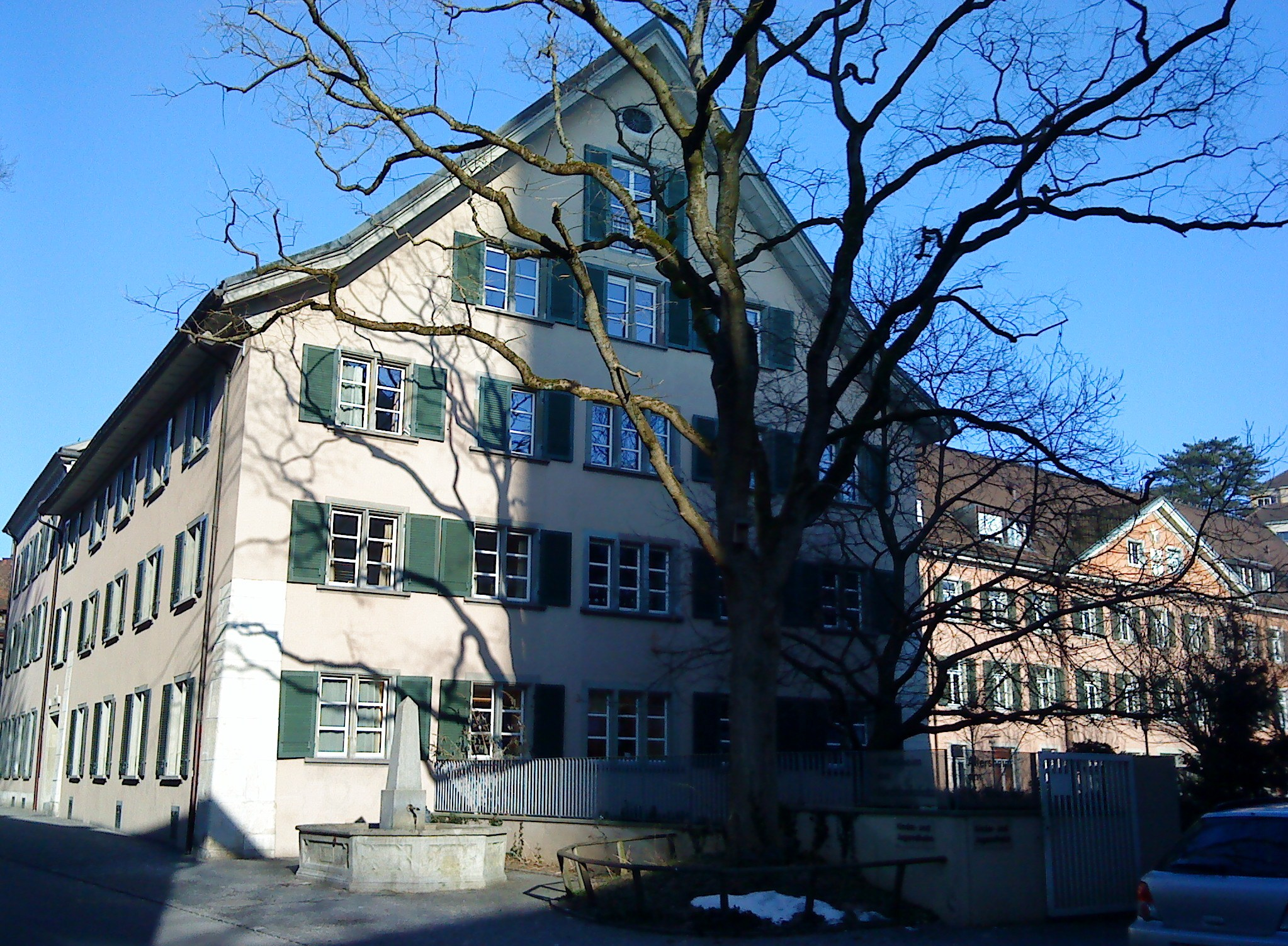 Altersheim am Kirchhofplatz (Pfrundhaus) in Schaffhausen, ehemals Kloster Sankt Agnesen.